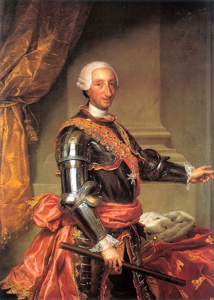 Retrato del rey Carlos III de España (1716-1788), que fue hijo del rey Felipe V de España y de su segunda esposa, la reina Isabel de Farnesio.